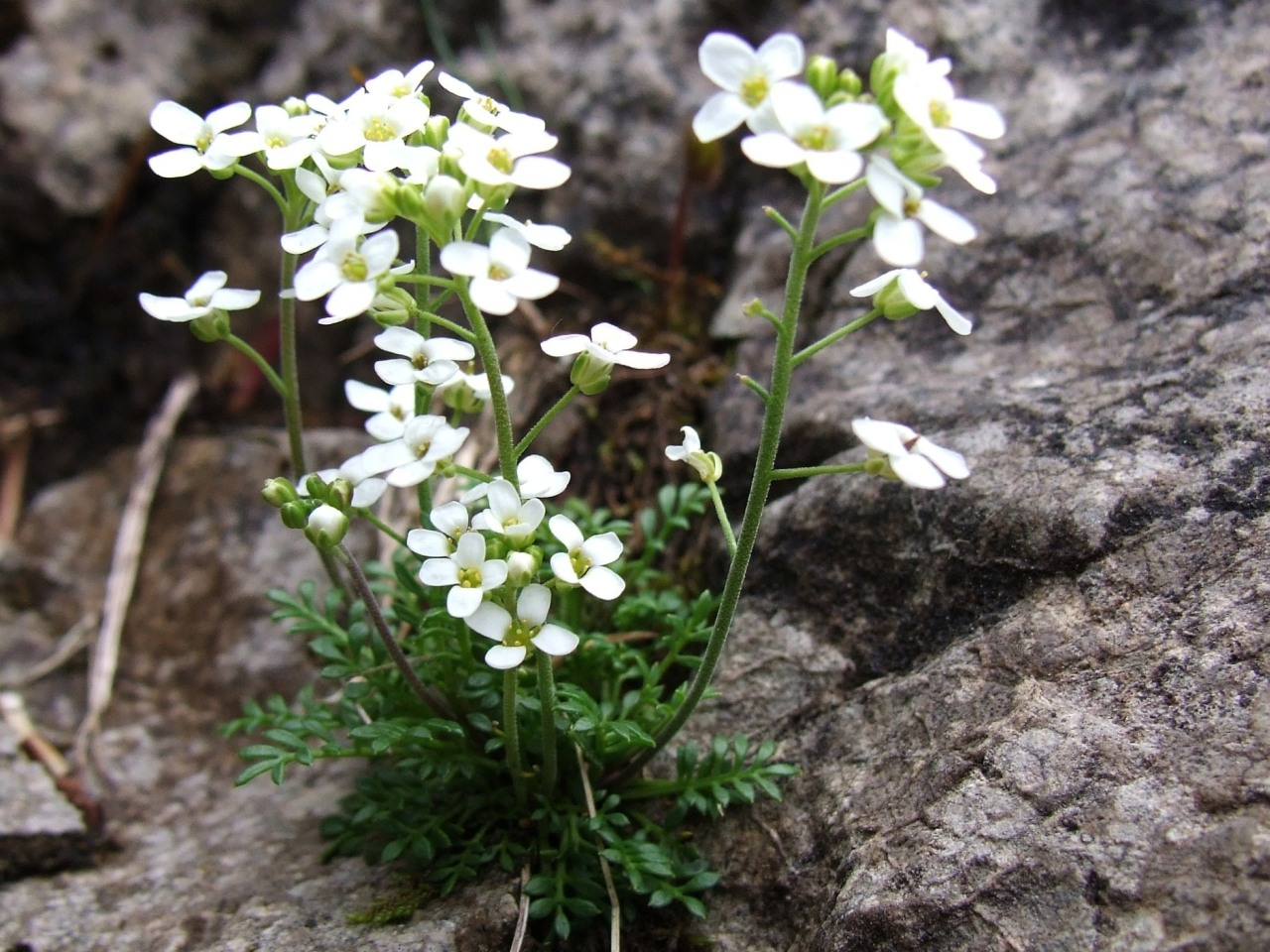 Hutchinsia alpinia